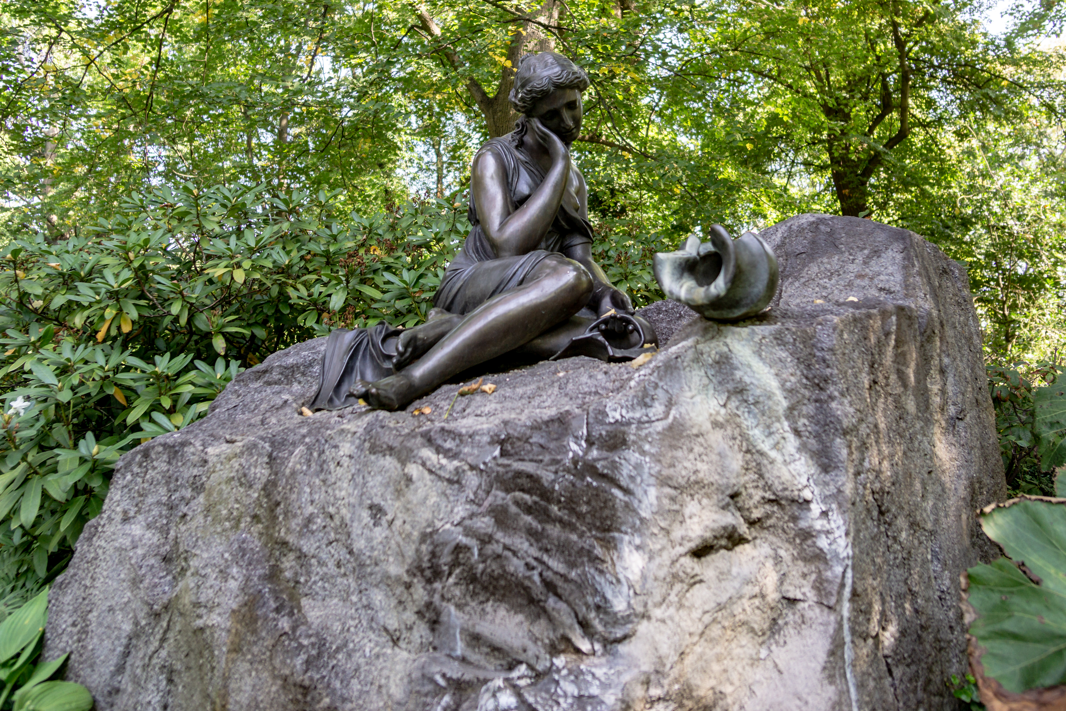 Schloss Britz